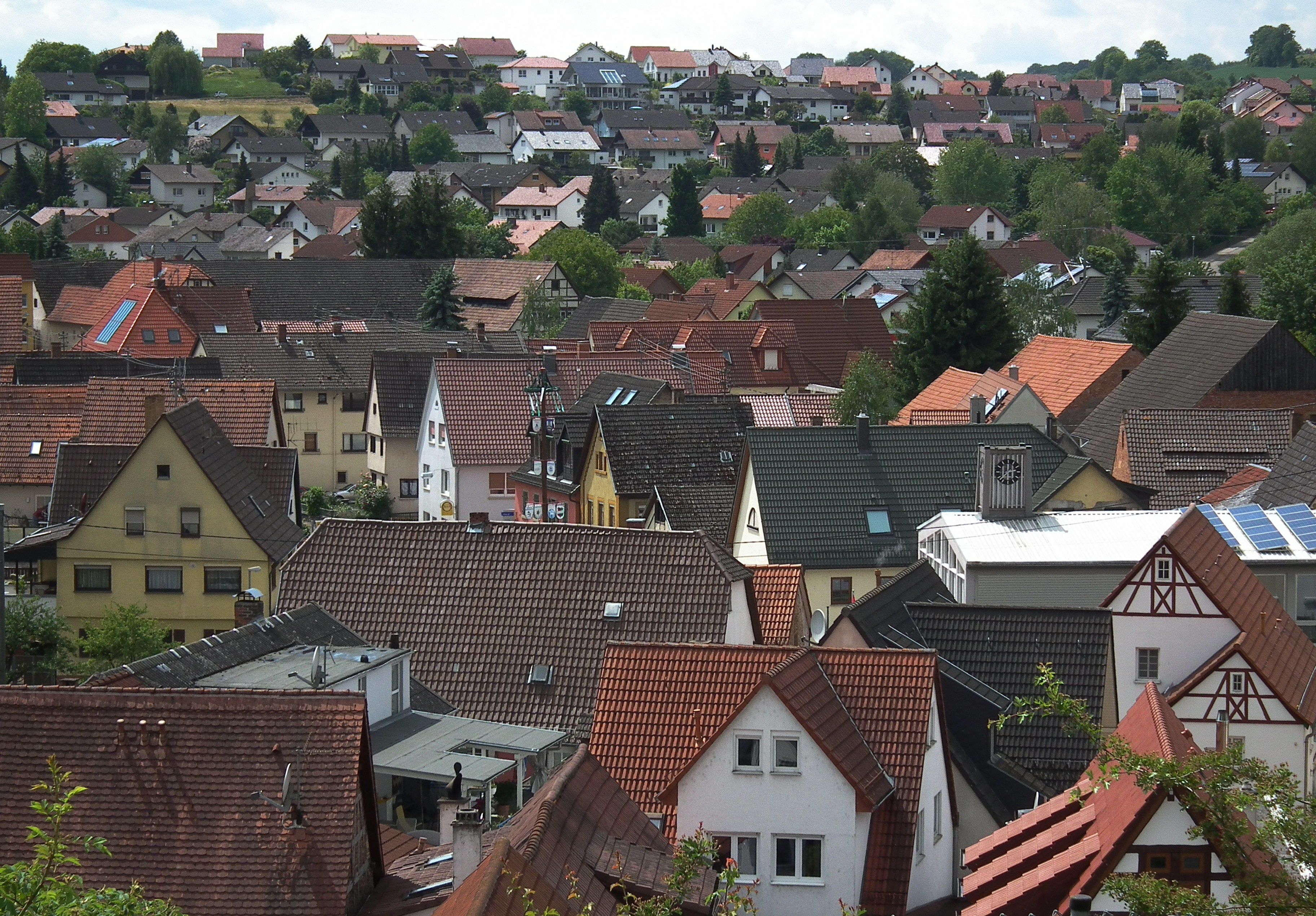 Ortskern von Zuzenhausen (Baden-Württemberg, Deutschland)